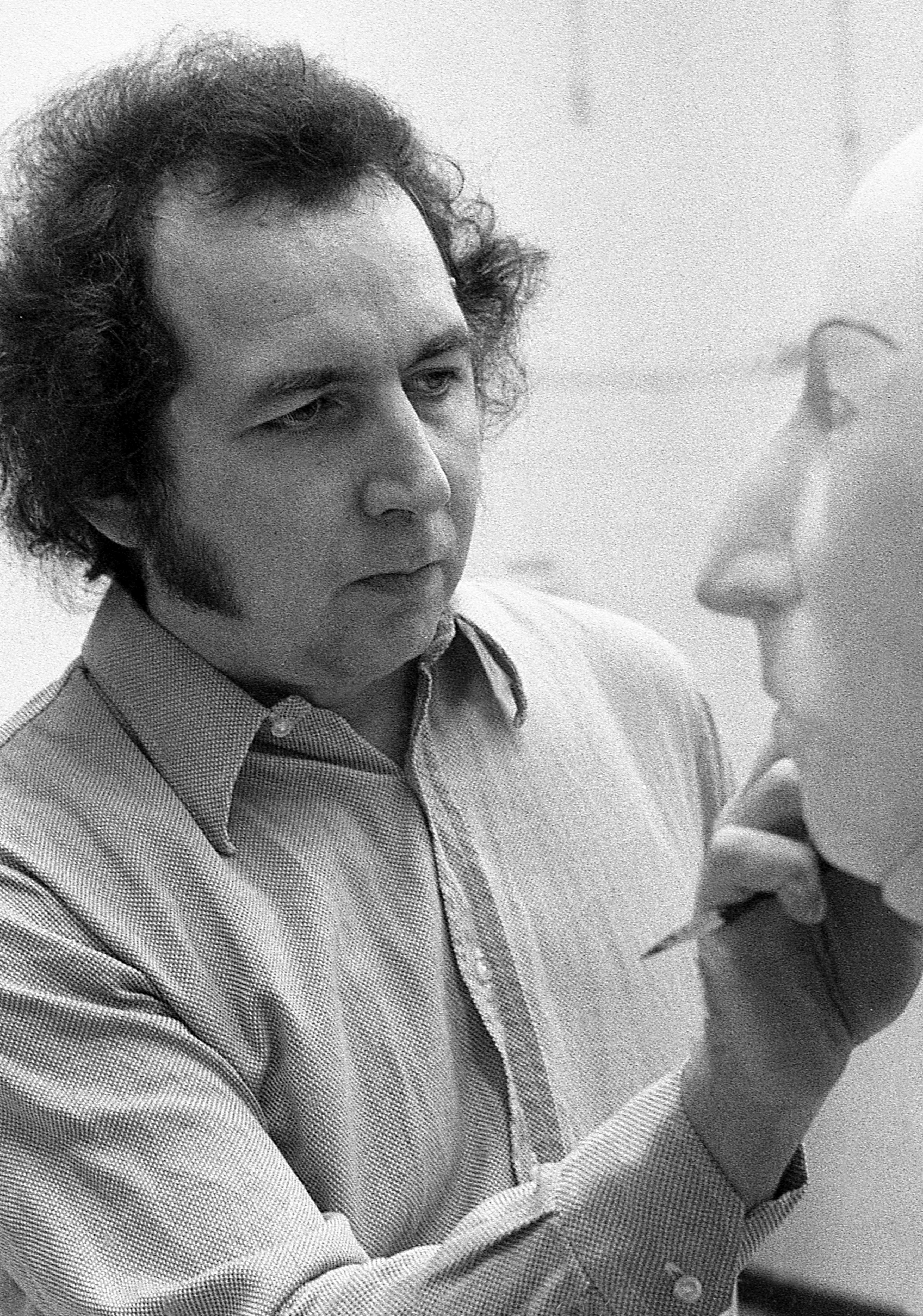 Bildhauer